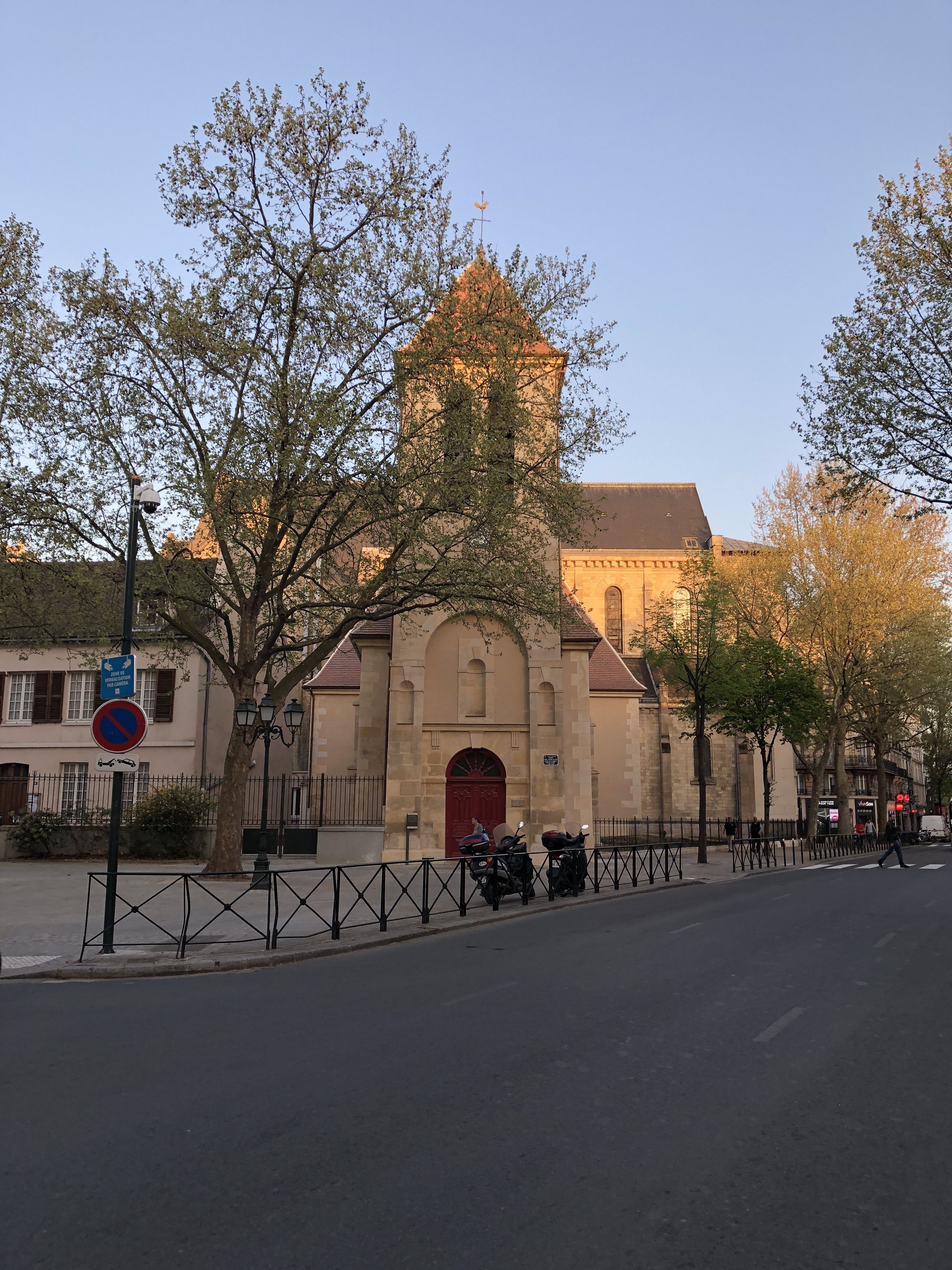 Photo de l'église Saint Mdédard de Clichy prise après sa restauration (2016-2018)